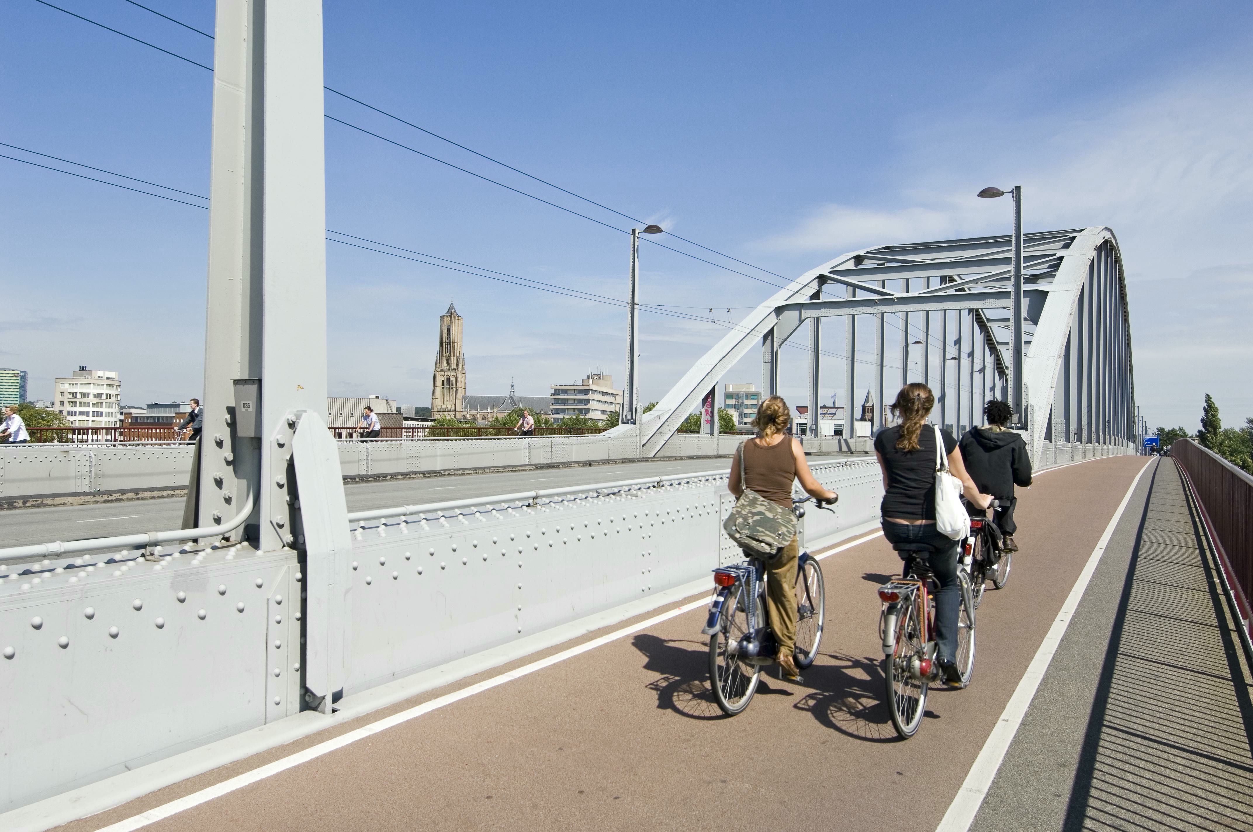 John Frostbrug: Overzicht Johan Frostbrug met rechts het fietspad (opmerking: Gefotografeerd voor Monumenten van Herrezen Nederland)